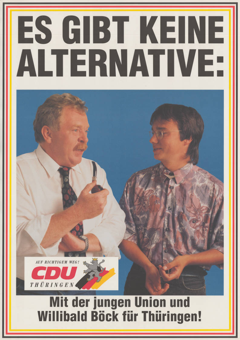 Es gibt keine Alternative: Auf richtigem Weg! CDU Thüringen Mit der Jungen Union und Willibald Böck für Thüringen!Abbildung:Foto - Willibald Böck krempelt die Hemdsärmel hoch im Gespräch mit einem JU-Mitglied - Thüringer Löwe - NationalfarbenPlakatart:Kandidaten-/Personenplakat mit PorträtAuftraggeber:CDU LV ThüringenObjekt-Signatur:10-037 : 116Bestand:Landtagswahlplakate Thüringen (10-037)GliederungBestand10-18:Landtagswahlplakate Thüringen (10-037) » CDULizenz:KAS/ACDP 10-037 : 116 CC-BY-SA 3.0 DE